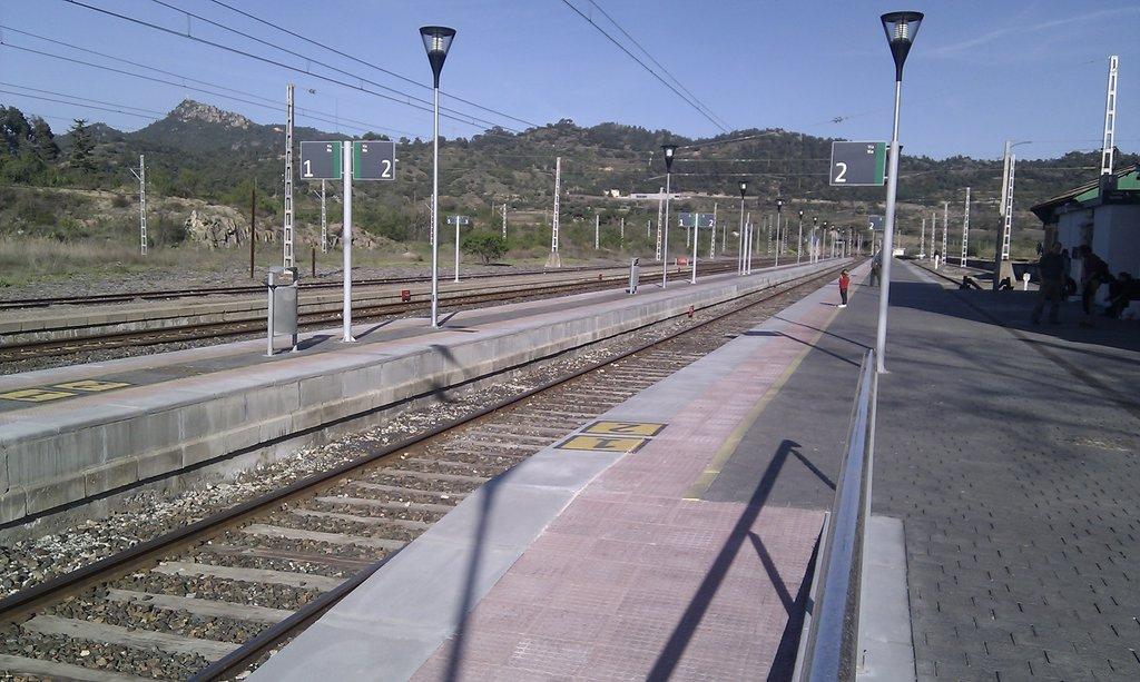 Estación de Marsá-Falset (provincia de Tarragona).